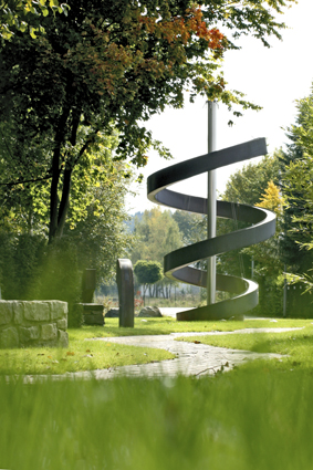 Großskulpturen des Künstlers Lutz Bernsau im Skulpturenpark der KRAH Gruppe